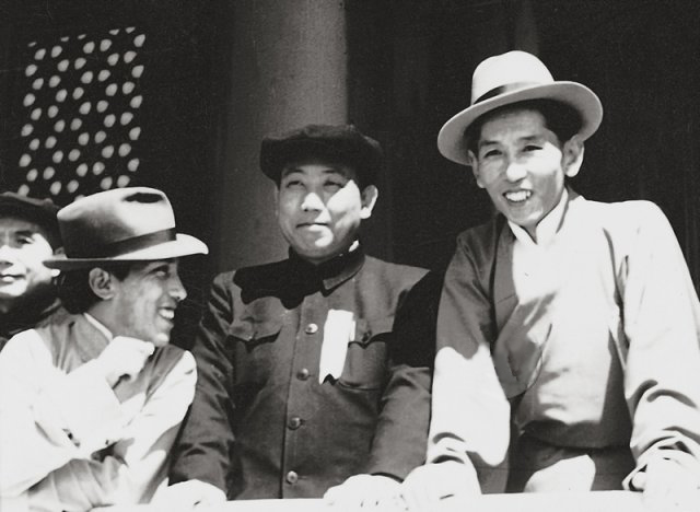 1951年5月1日北京 Phuntsok Tashi Takla, Zhandong Jijinmei and Ngabo Ngawang Jigme